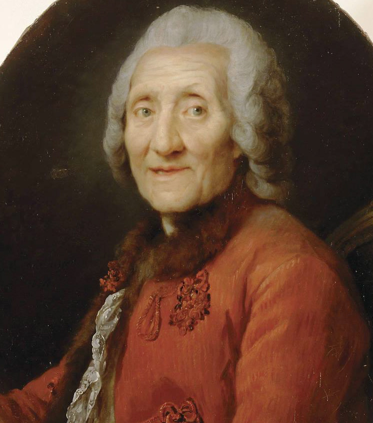 Joseph-Charles Roettiers (1692-1779), sculpteur, graveur en médailles et orfèvre